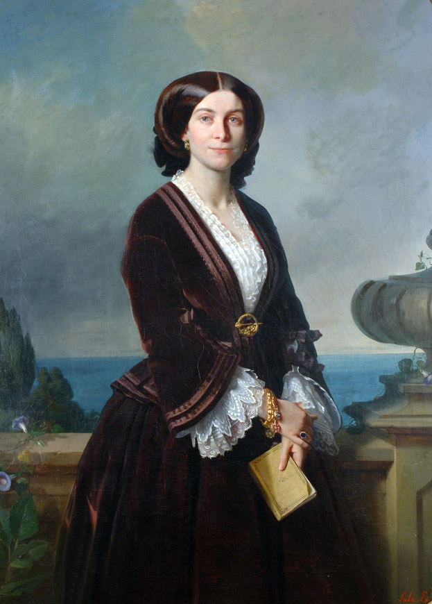 Emma Mac Kinnon, duchesse de Gramont